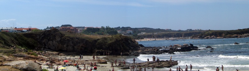 Praia da Lanzada, panorámica - O Grove - Pontevedra